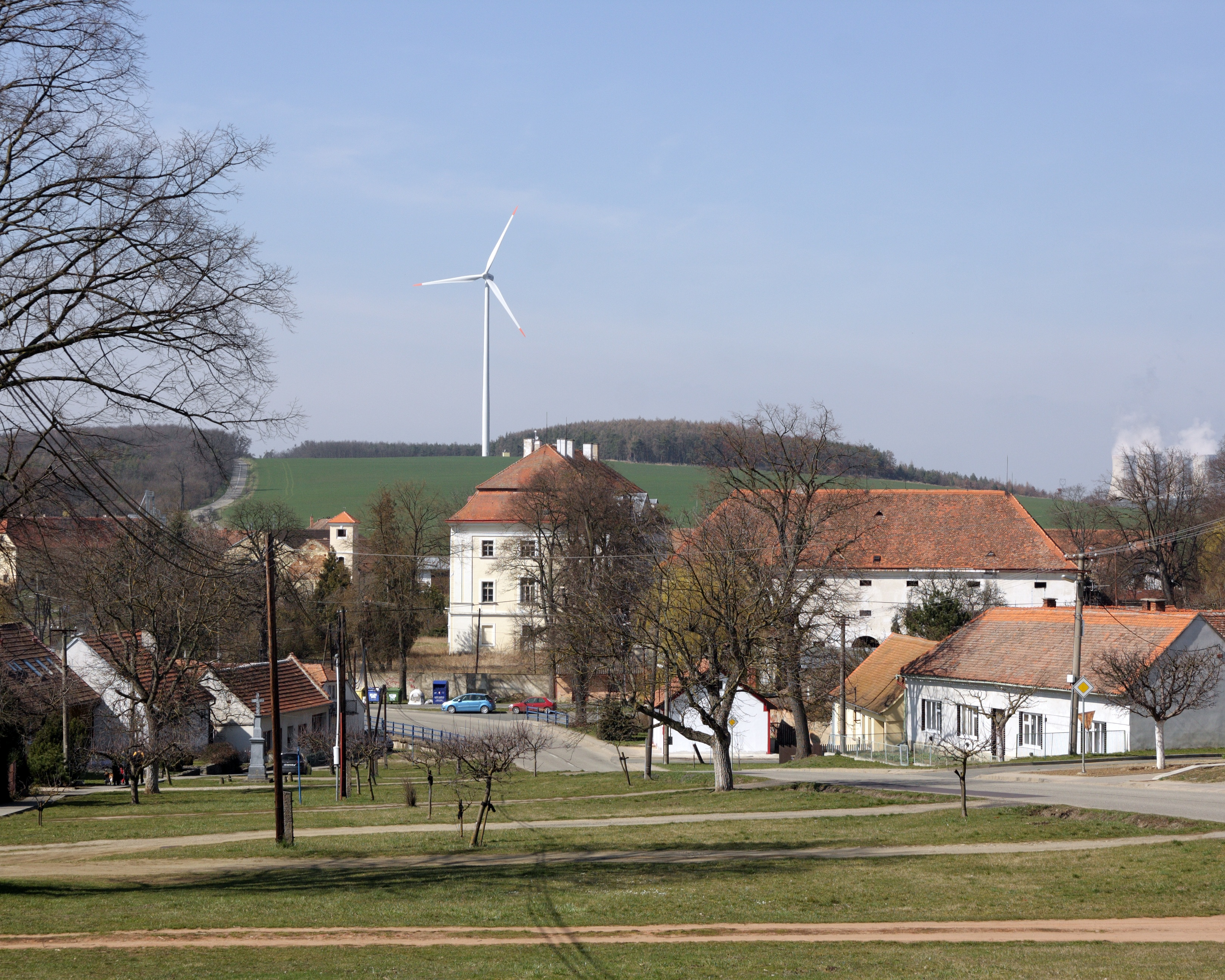 Tulešice - náves od východu.